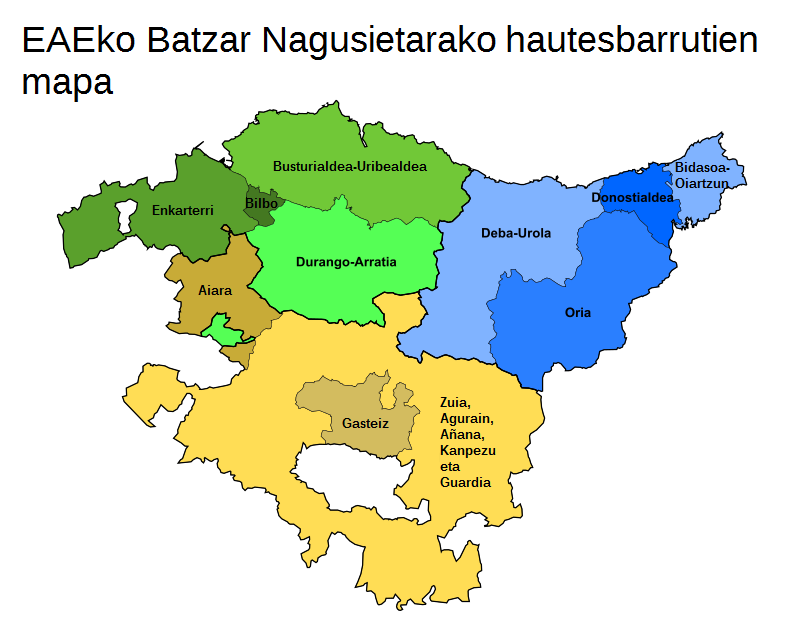 EAEko Batzar Nagusietarako hauteskundeetan baliatzen diren hautesbarrutiak. Mapa ez da gardena.